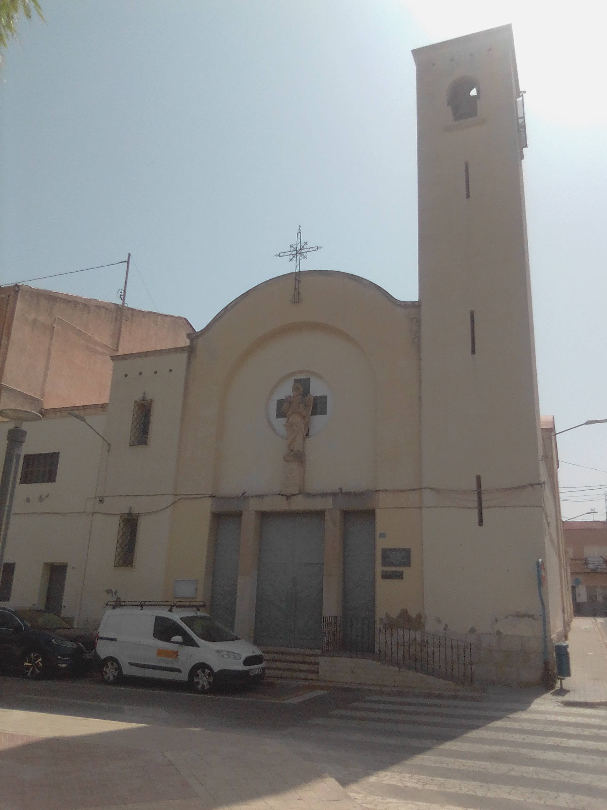 Iglesia de San Gabriel en Alicante.